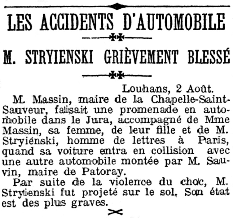 Article du Petit Journal, 3 août 1912, relatant l'accident dont a été victime Casimir Stryienski.